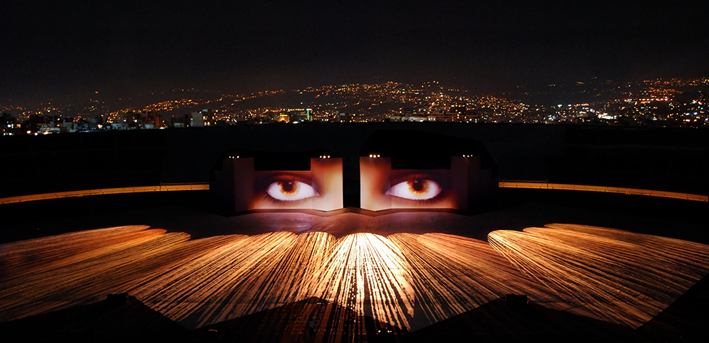 Cérémonie d'Ouverture des 6ème Jeux de la Francophonie, Liban 2009